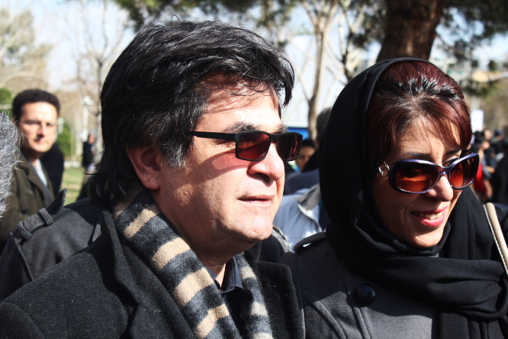 جعفر پناهی در مراسم خاکسپاری زاون قوکاسیان-اصفهان